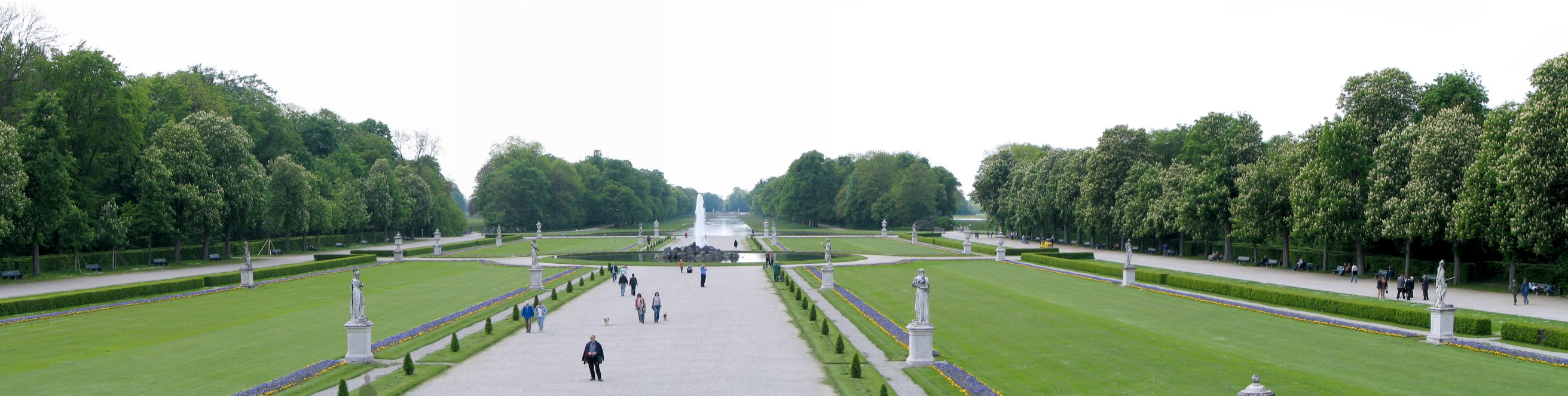 Beschreibung: Schlosspark Nymphenburg Quelle: selbst fotografiert Datum: Mai 2005 Fotograf / Zeichner: Patrick Huebgen